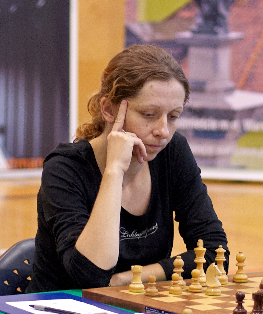 GM Monika Soćko, Memoriał Mieczysława Najdorfa, Warszawa 2012.